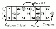 Tombola Alla Francese Point setup